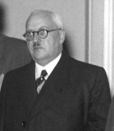 Otto Cornelis Adriaan van Lidth de Jeude (1881-1952), Nederlands politicus